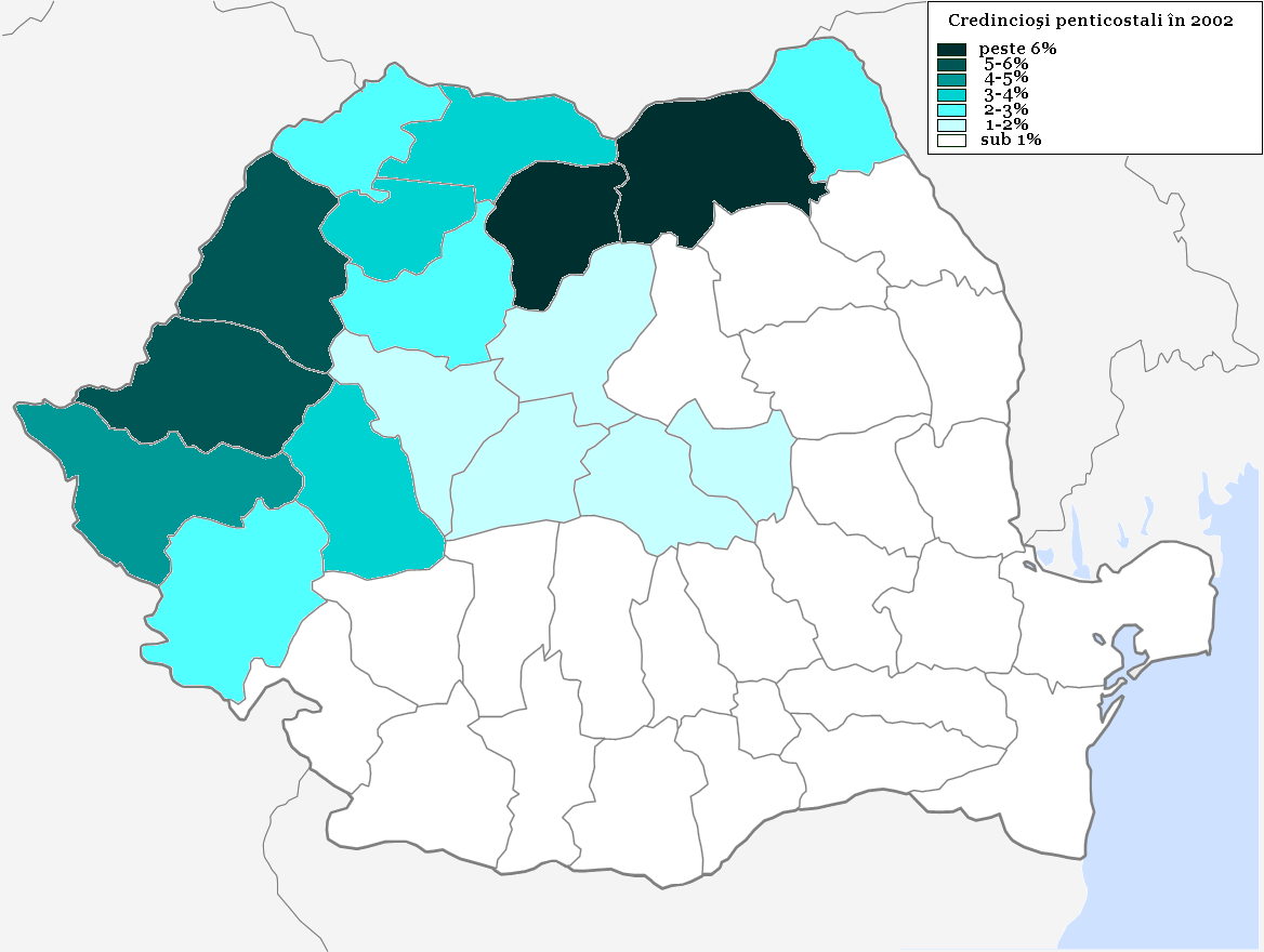 Proporţia credincioşilor penticostali din România, pe judeţe.